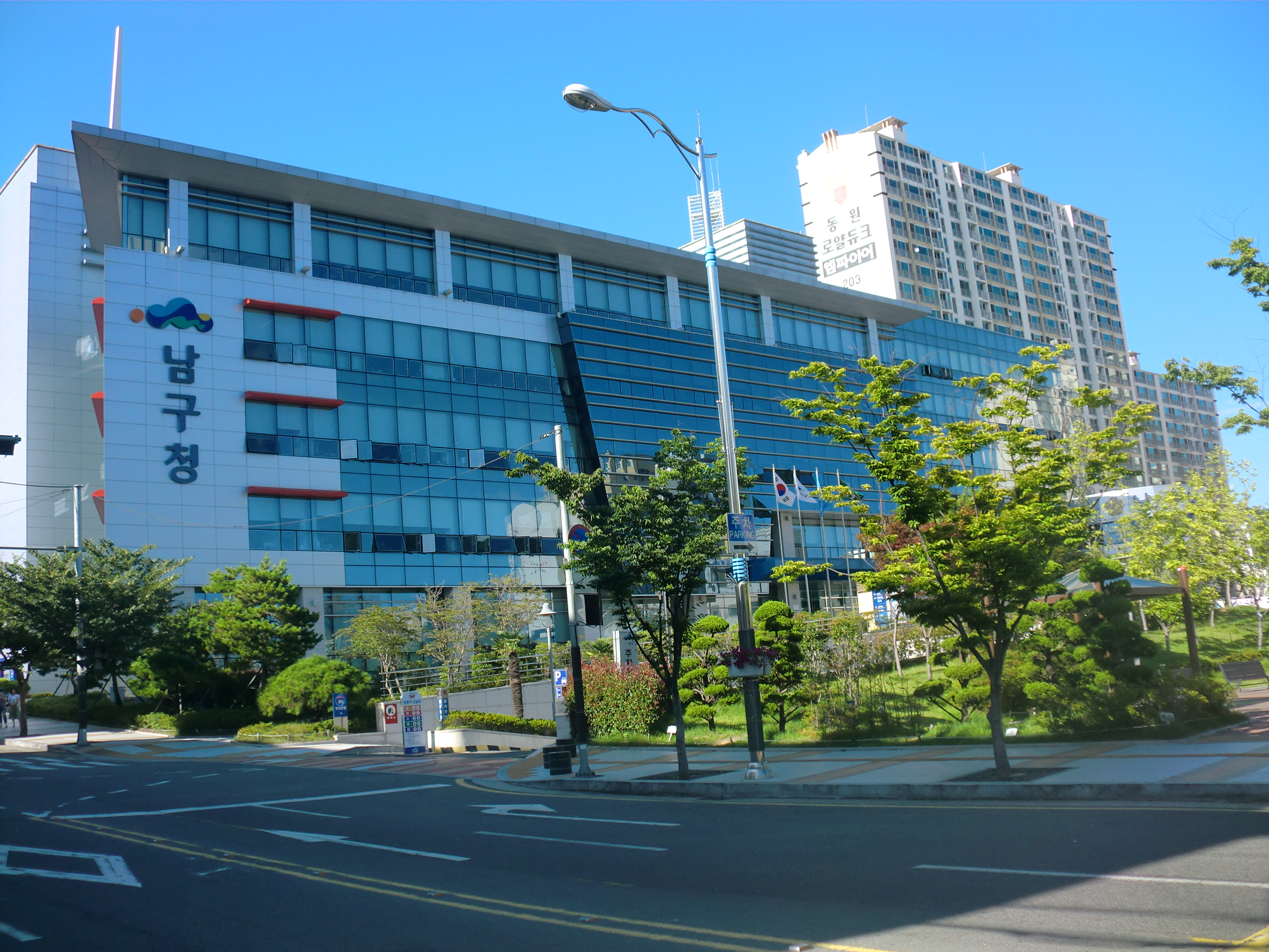 부산광역시 남구에 있는 남구청